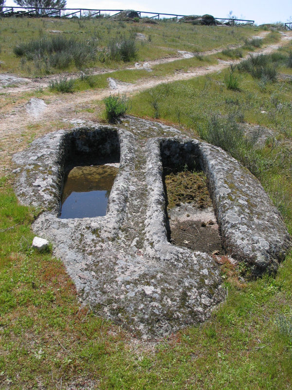 Sepulturas escavadas na rocha. Necrópole medieval de Forcadas, Fornos de Algodres, Portugal.